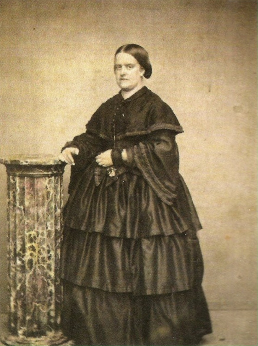 Princesa D. Januária (1822-1901), irmão de D. Pedro II, casada com o Conde D´Áquila, irmão da Imperatriz Teresa Cristina, casada com D. Pedro II, ou seja, ela era irmã e cunhada de D. Pedro II. Foto de 1859